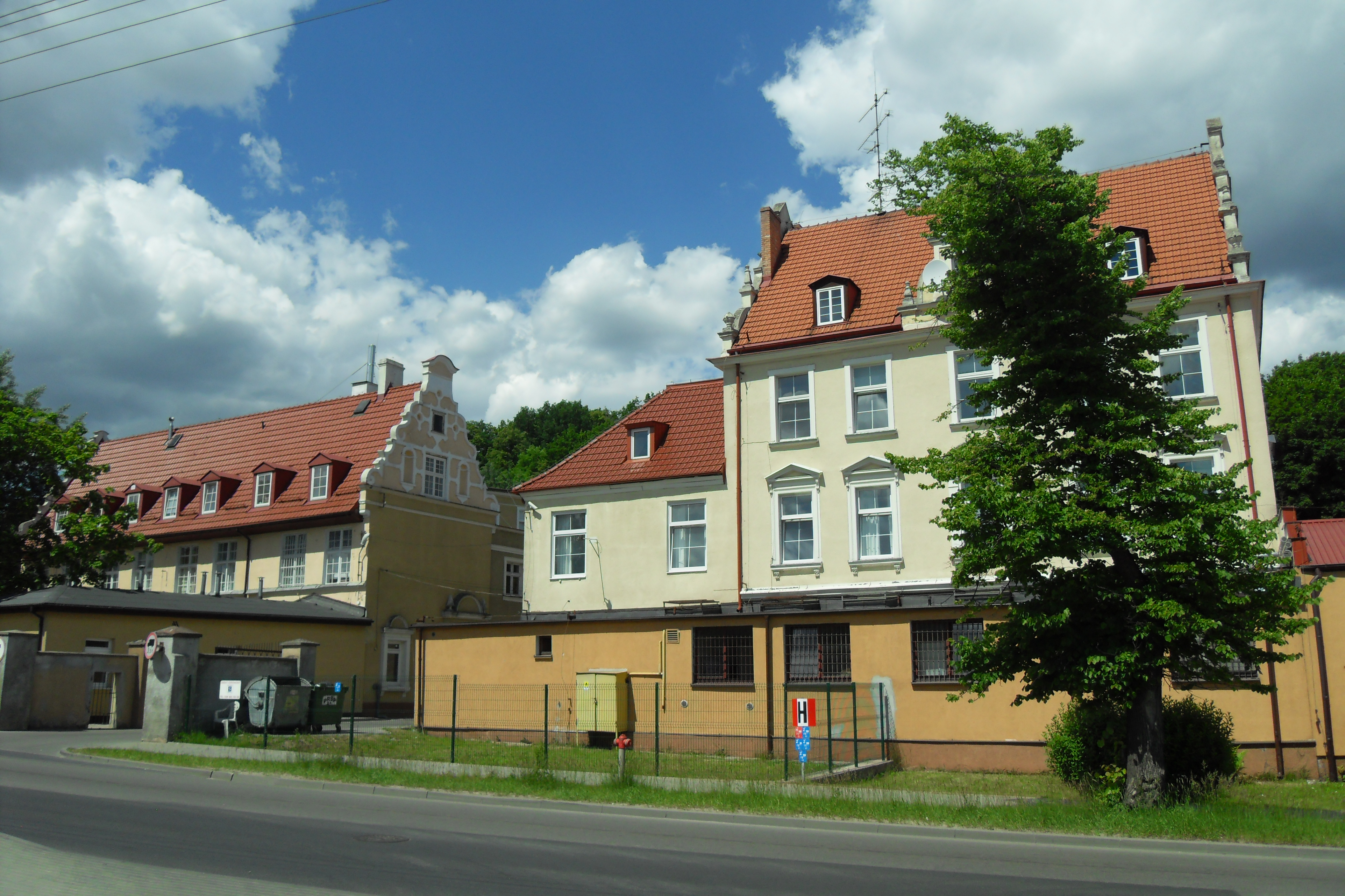 Gdańsk Krzyżowniki (Siedlce). Dwór Krzyżowniki, ul. Kartuska 245A i 245.